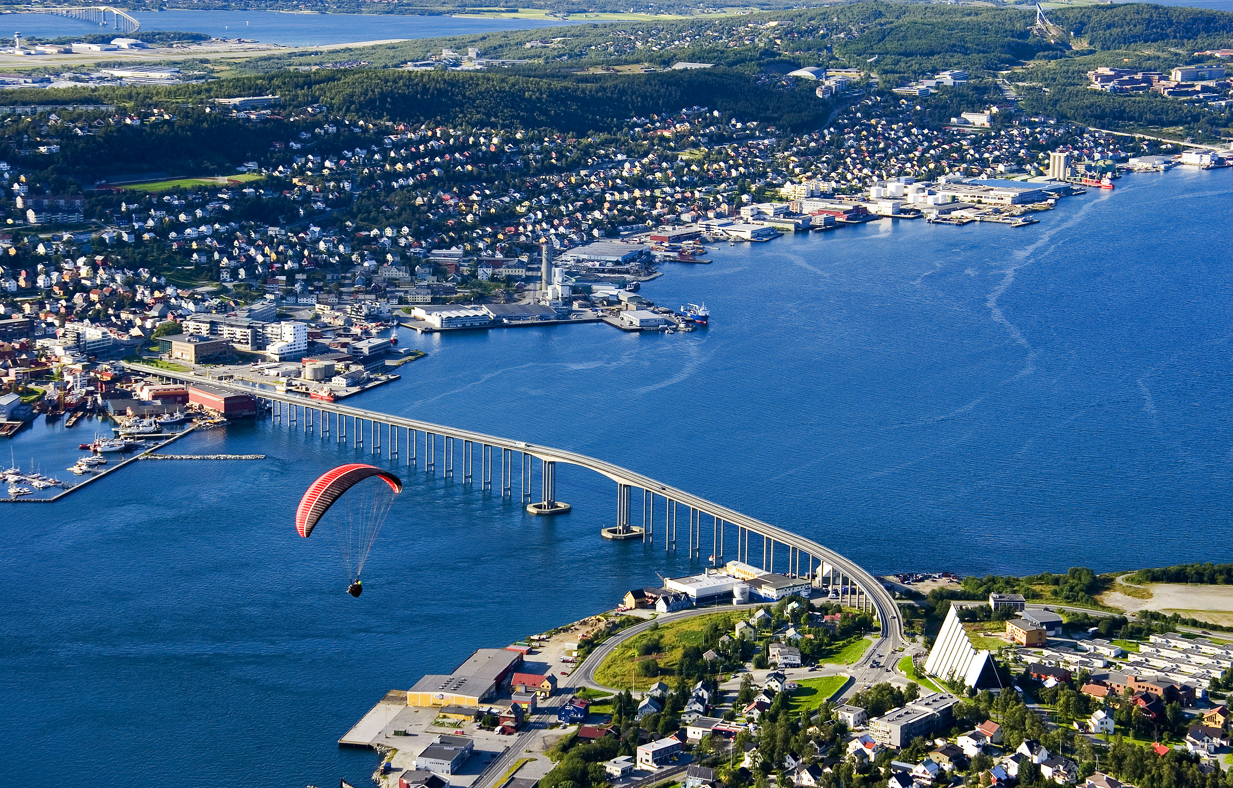 Improved version of Image:Fjellheisen Aussicht Bruecke Kirche.jpg Original description: Aussicht vom Storsteinen / Tromsø